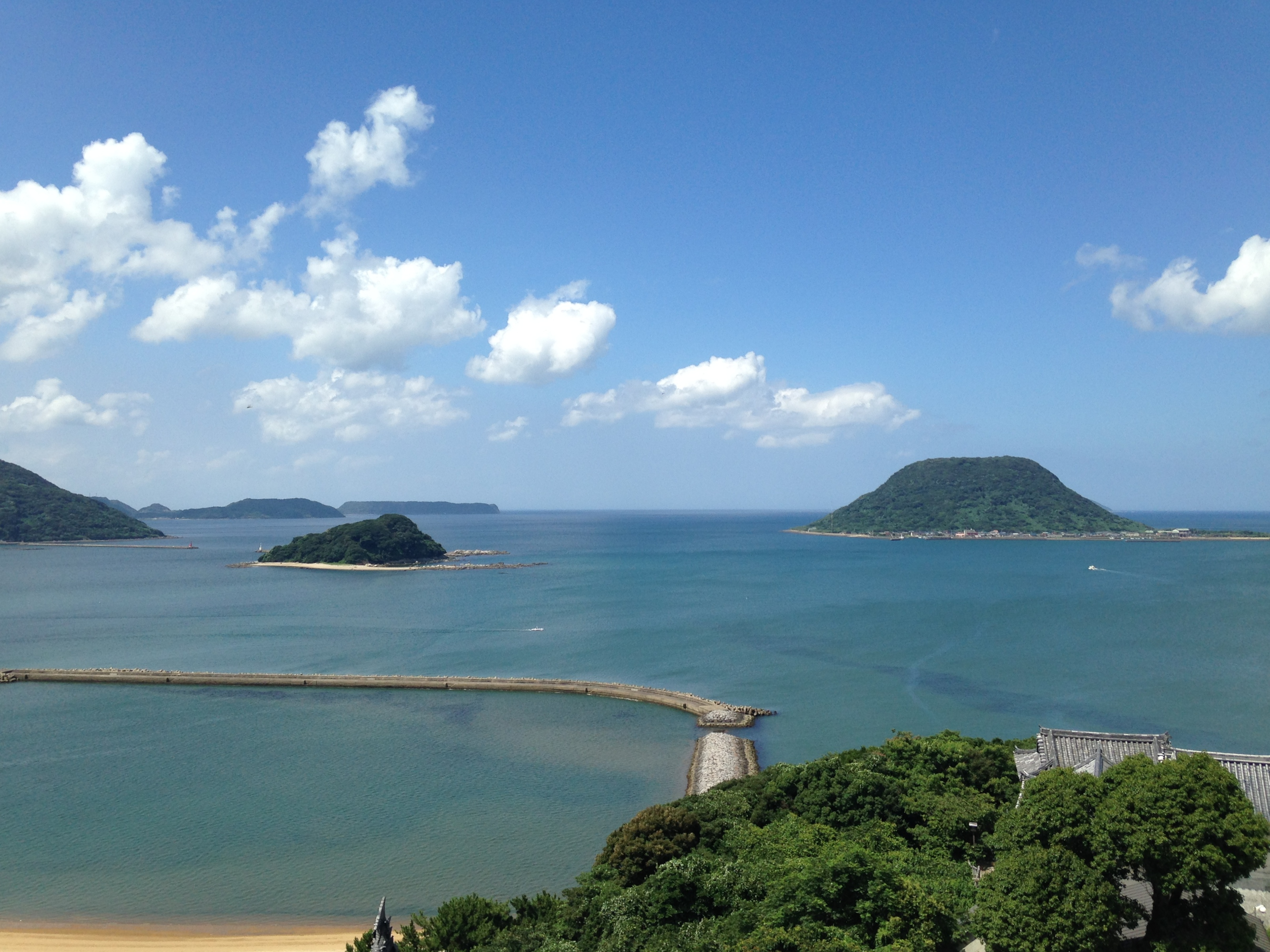 唐津城天守閣からの眺め(高島・鳥島方面)